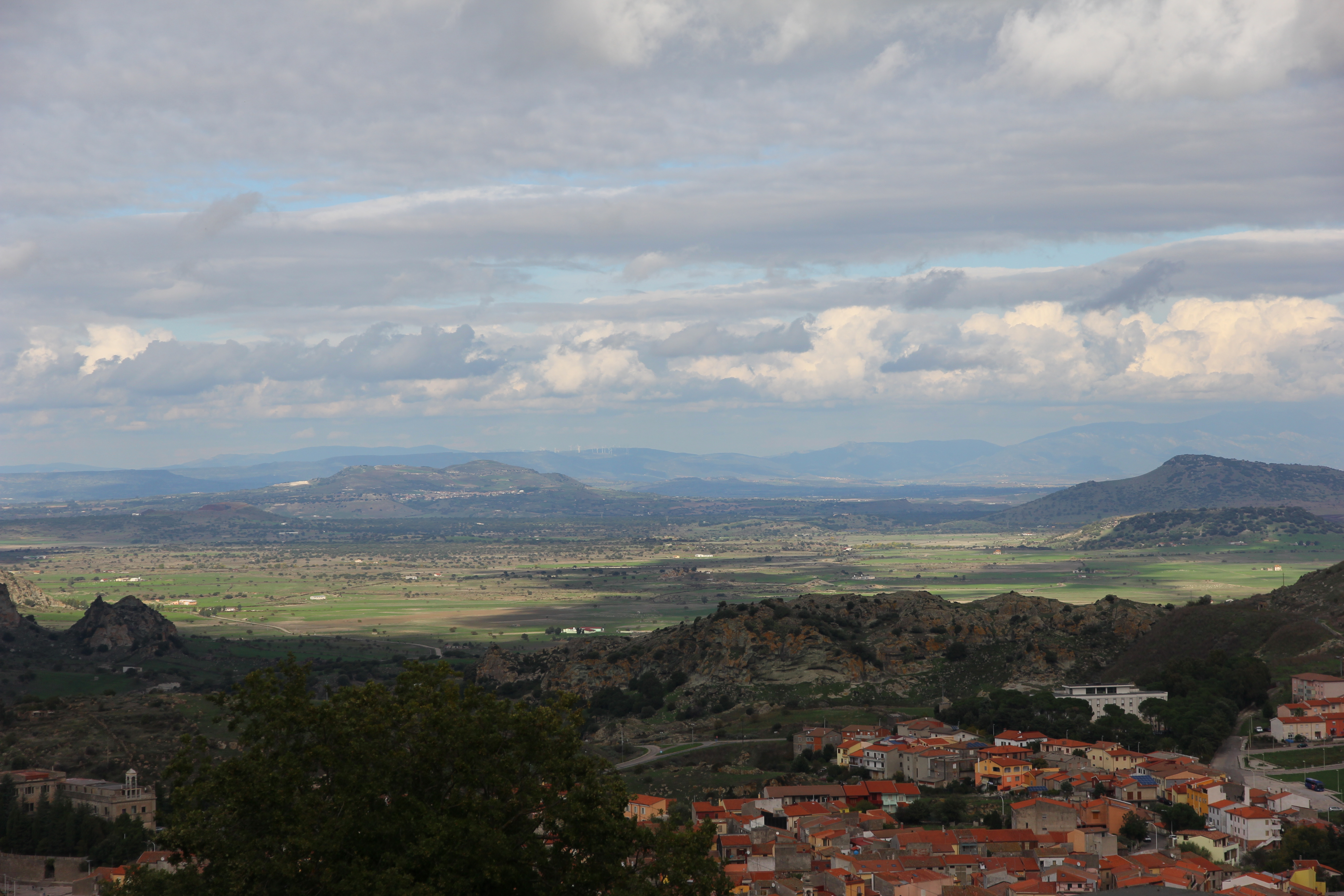 Bonorva - Piana di Santa Lucia